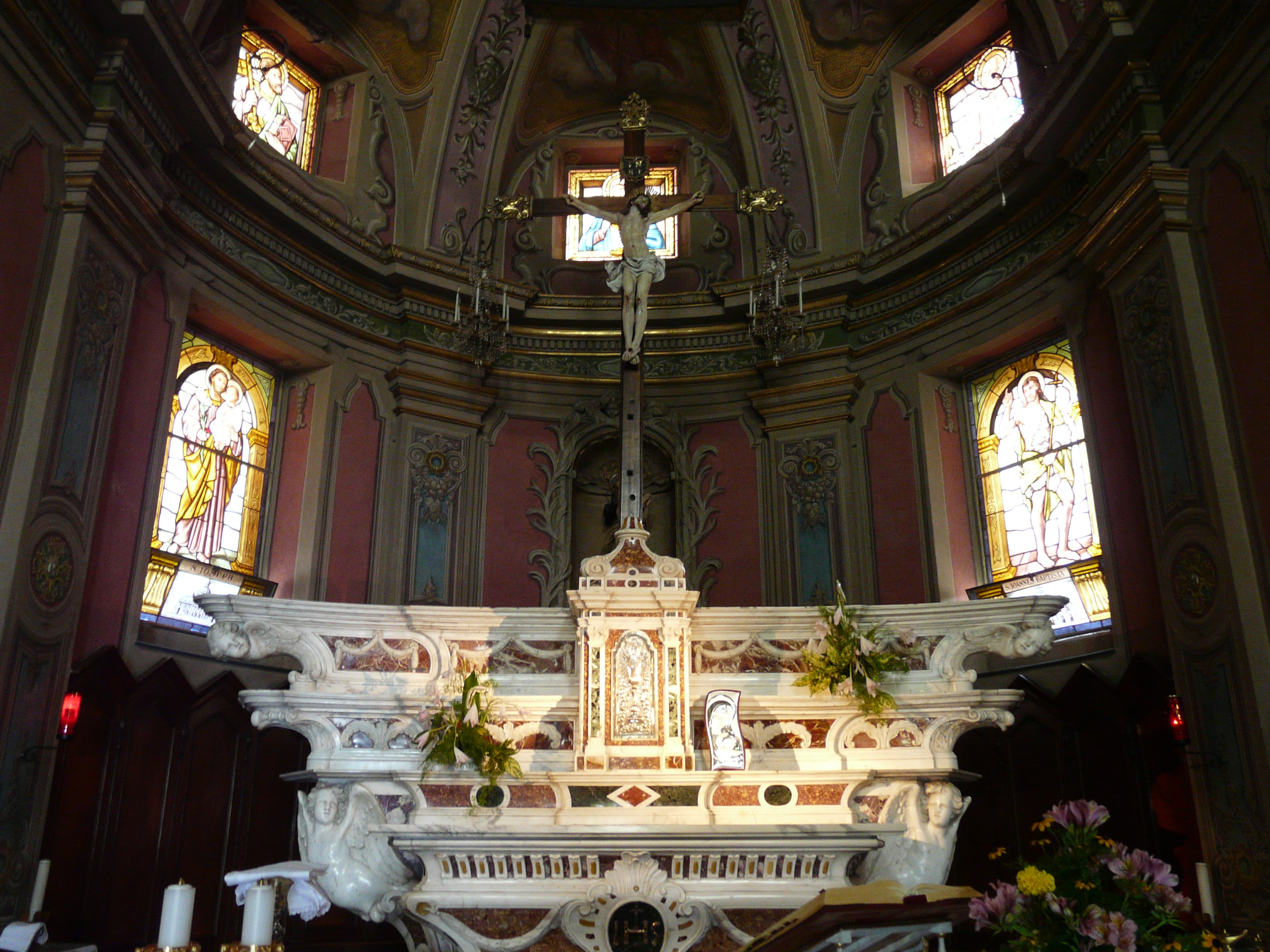 Altare della Chiesa di San Martino di Polanesi, Recco, Liguria, Italia